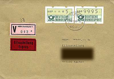 Wertbrief (28.500 DM) mit Eilzustellung (28 g) vom 19. Mai 1993. Frankiert mit je einer Marke à 9995 Pfennig und à 5 Pfennig (= 10.000 Pfennig: 200 Brief + 700 Eilzustellung + 700 Wert + 8.400 Behandlungsgebühr)